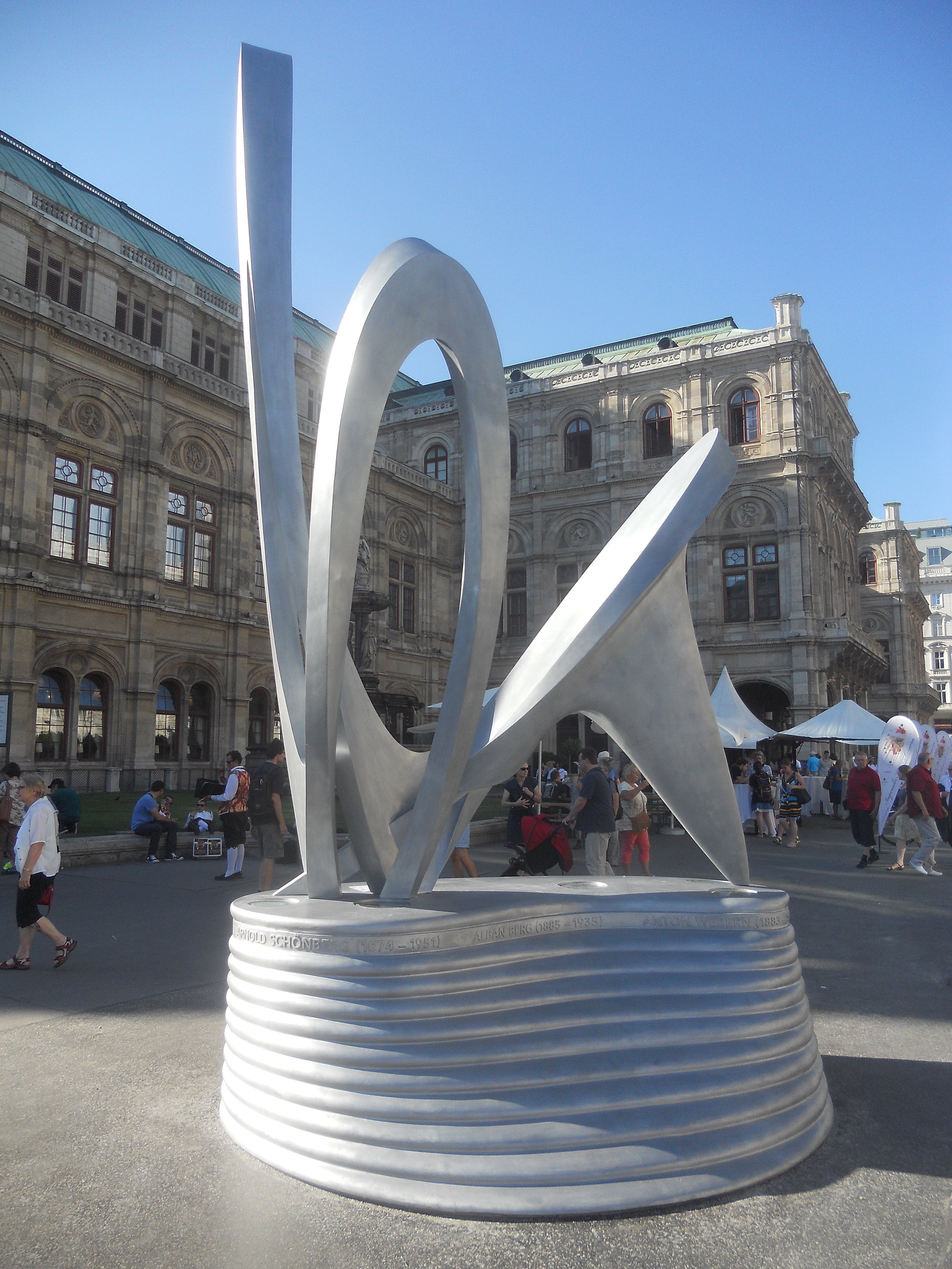 Das Alban-Berg-Denkmal vor der Wiener Staatsoper, das darüber hinaus der Zweiten Wiener Schule der Musik und der Direktion Mahlers an diesem Haus gewidmet ist.